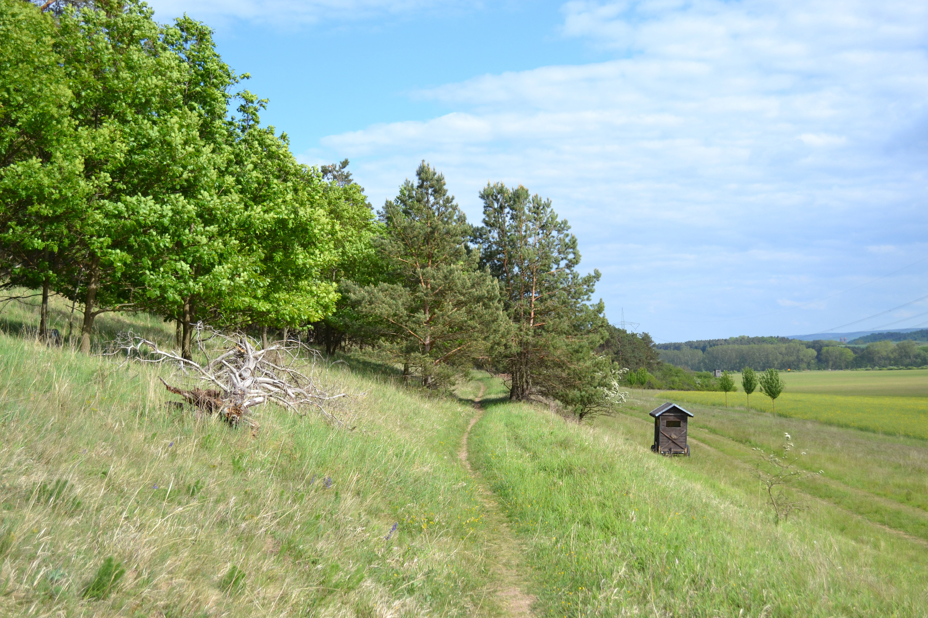 Wanderweg Südseite des Naturschutzgebietes Steinholz, Trockenrasengebiet